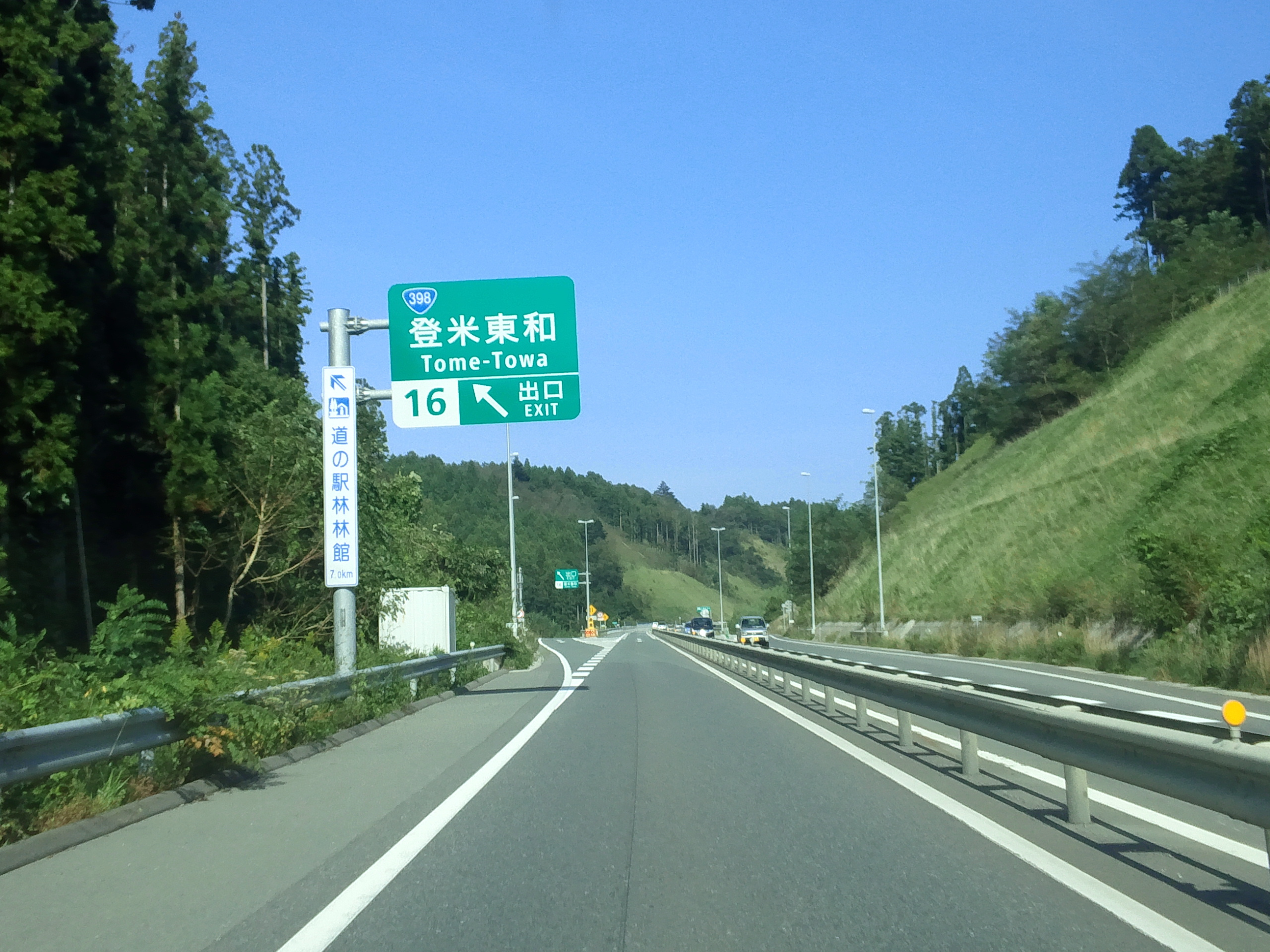 三陸自動車道登米東和IC（下り）出口付近